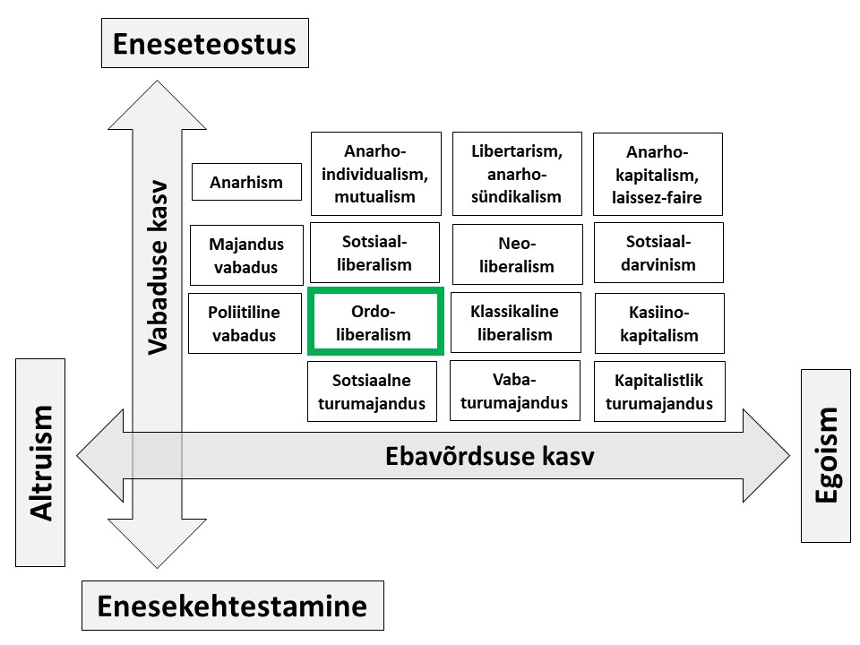 Ordoliberalism sotsiaalse korra mudelis